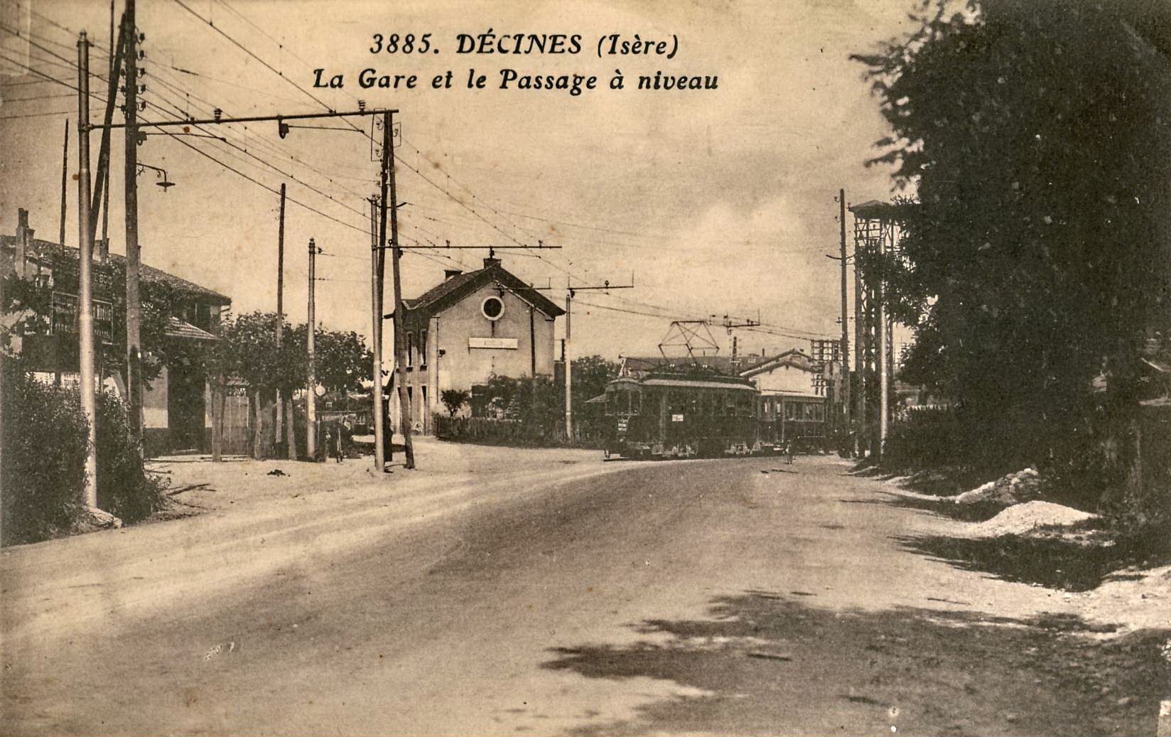 Carte postale ancienne éditée par Goutagny, N°3885Décines : La Gare et le Passage à NiveauVue du tramway électrique de l'OTL (motrice Manage et remorque Mono ) au niveau du passage à niveau de la ligne du Chemin de fer de l'Est de Lyon